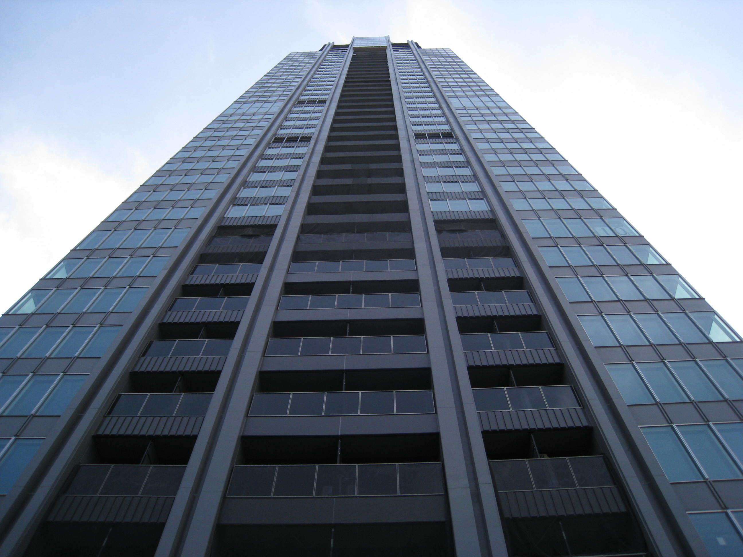 THE ROPPONGI TOKYO